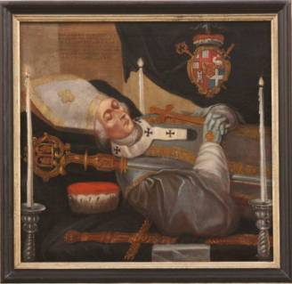 Fürstbischof Johann Hugo von Orsbeck